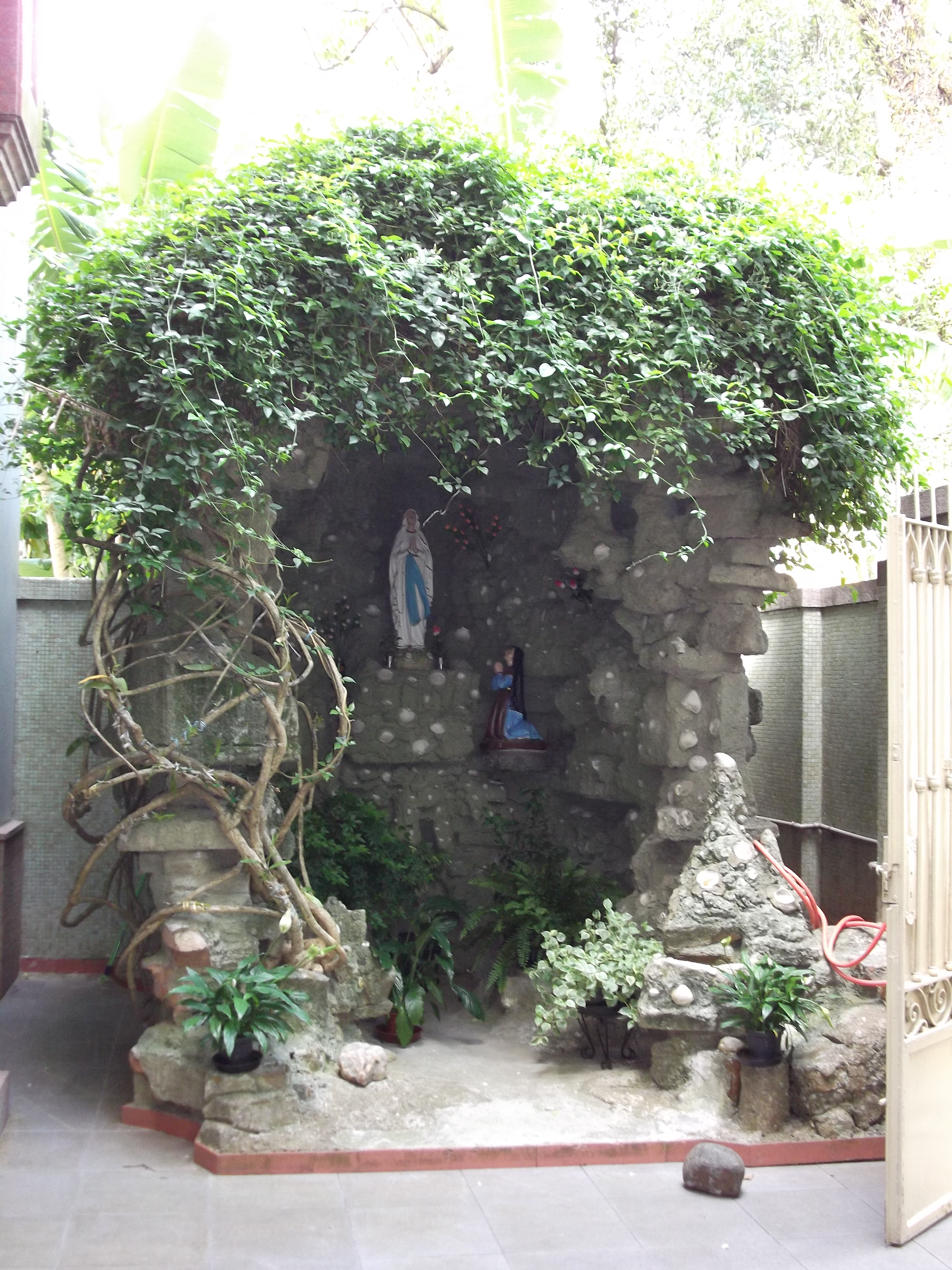 Gruta de Lourdes junto a Igreja São Rafael em Porto Alegre. Inaugurada em 12 fev. 1879 por D. Sebastião Laranjeira, Bispo da Diocese de São Pedro do Rio Grande do Sul, sendo a mais antiga da cidade.